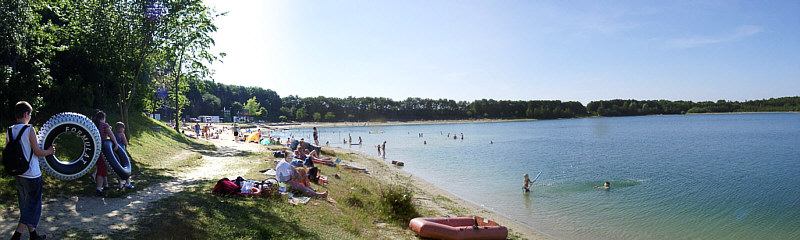 Badesee in Emstek, Landkreis Cloppenburg Quelle: selbst fotografiert Fotograf/Zeichner: --Eckhard Jakob 13:52, 11. Jul 2006 (CET) Datum: 2006-07-12 andere Versionen: hohe Auflösung auf Anfrage